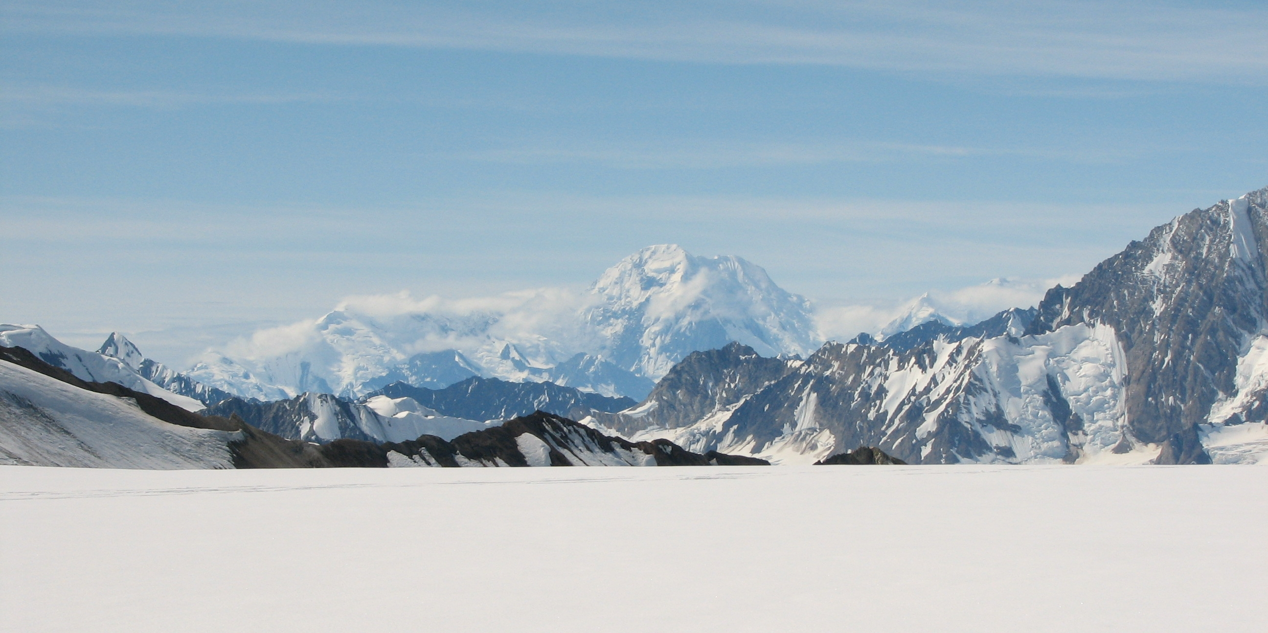 Kluane Icefield mit Blick auf Mt. Augusta in Alaska